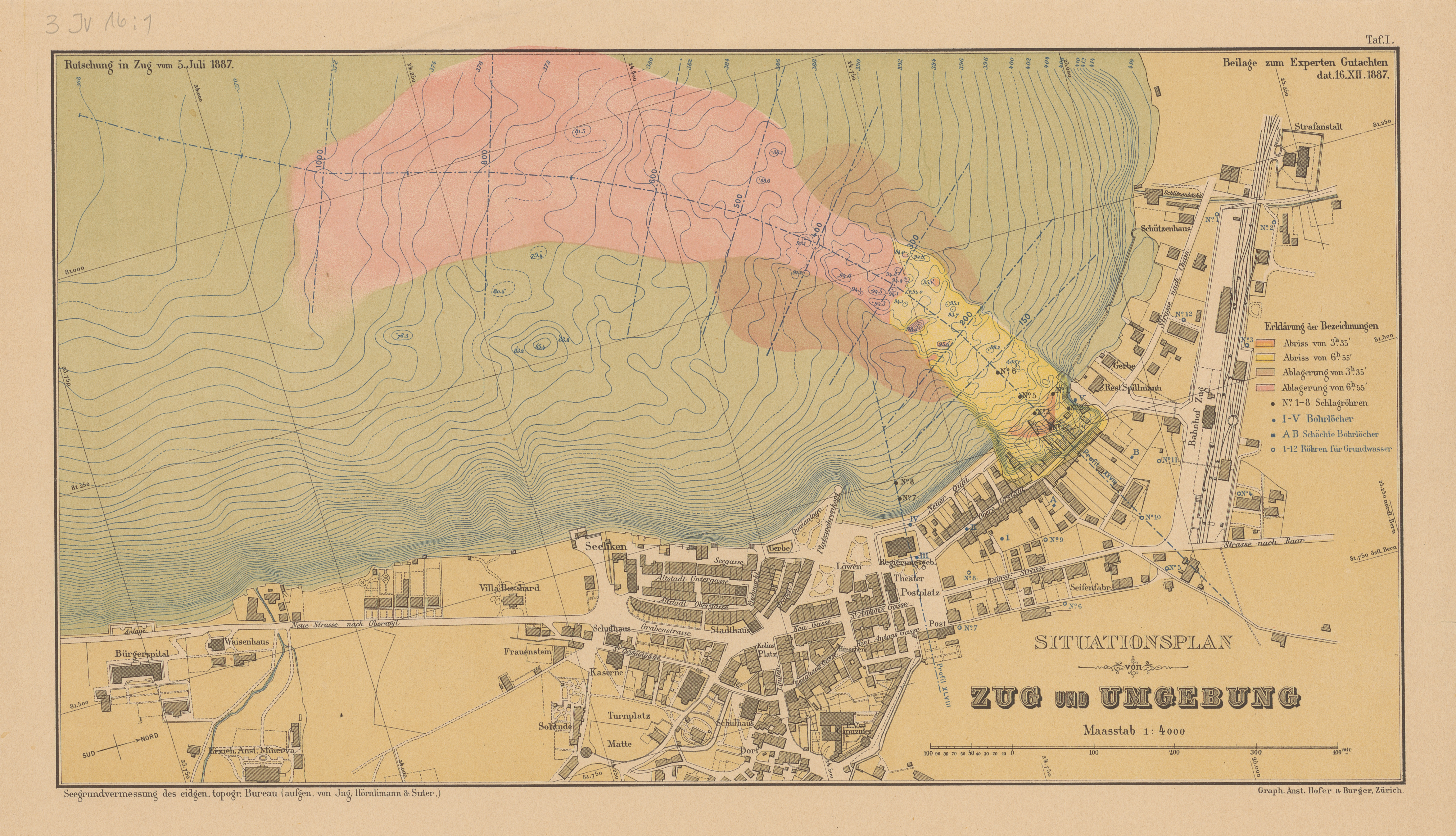 Titel: Situationsplan von Zug und Umgebung : Rutschung in Zug vom 5.Juli 1887 Impressum: Zürich : Hofer & Burger, 1887 Umfang: 1 Karte : mehrfarbig ; 22 x 41 cm Sprache: Deutsch Kartendaten: 1:4 000 (E 8°30'08"-E 8°31'08"/N 47°10'31"-N 47°09'31") Besitzende Institution: Zentralbibliothek Zürich Native nameZentralbibliothek ZürichLocationZürich, SwitzerlandCoordinates47° 22′ 27″ N, 8° 32′ 43″ E Established1914Web page control : Q190260 VIAF: 138960171 ISNI: 0000 0001 2308 337X LCCN: n50064102 GND: 1012546-2 NKC: ko2003195565 WorldCat institution QS:P195,Q190260 , 3 Jv 16: 1